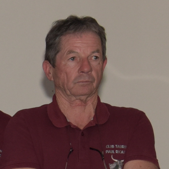 Emile Dumas